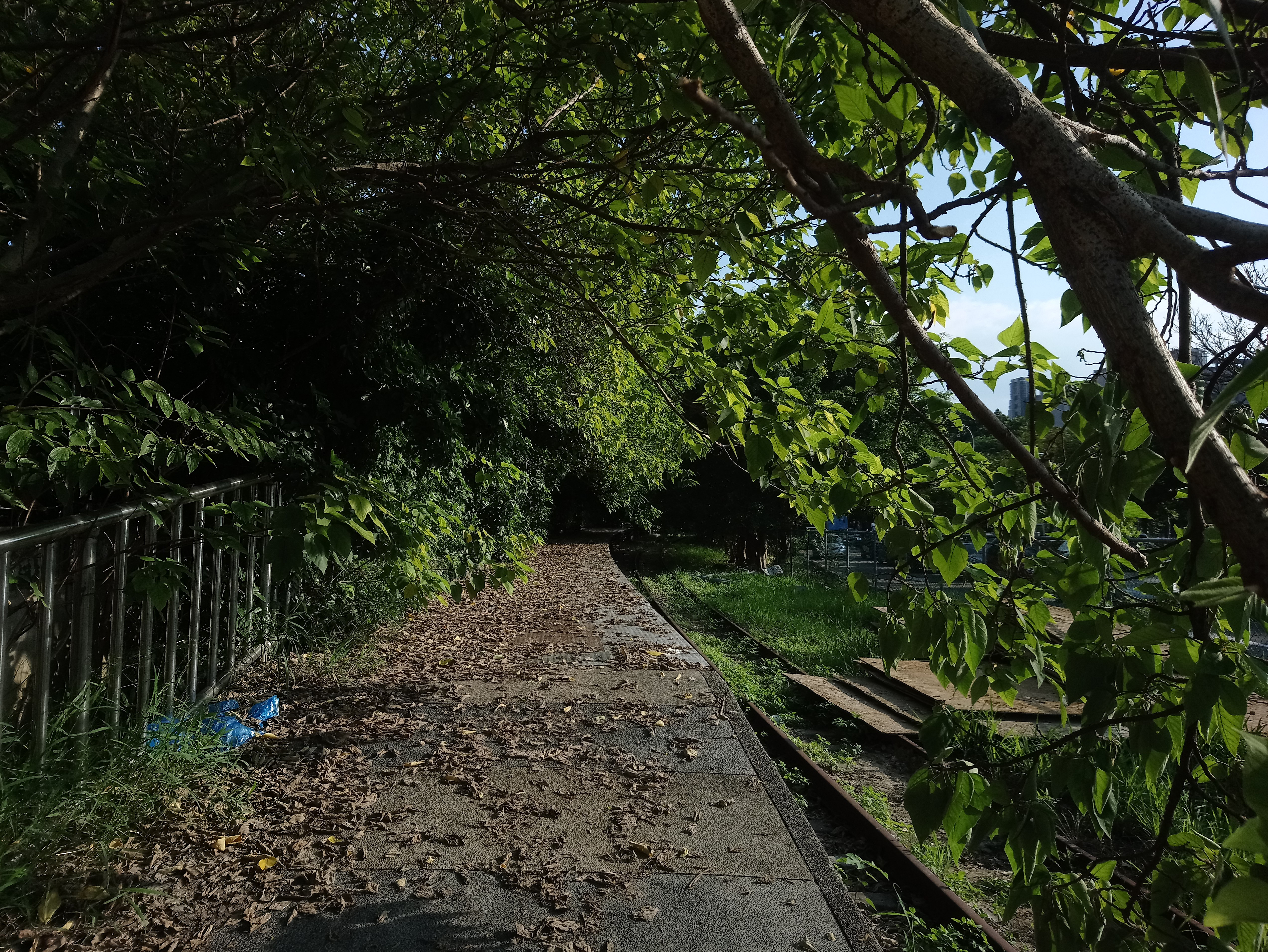 廢止後的桃園高中車站,桃園市桃園區大會稽次分區三元里